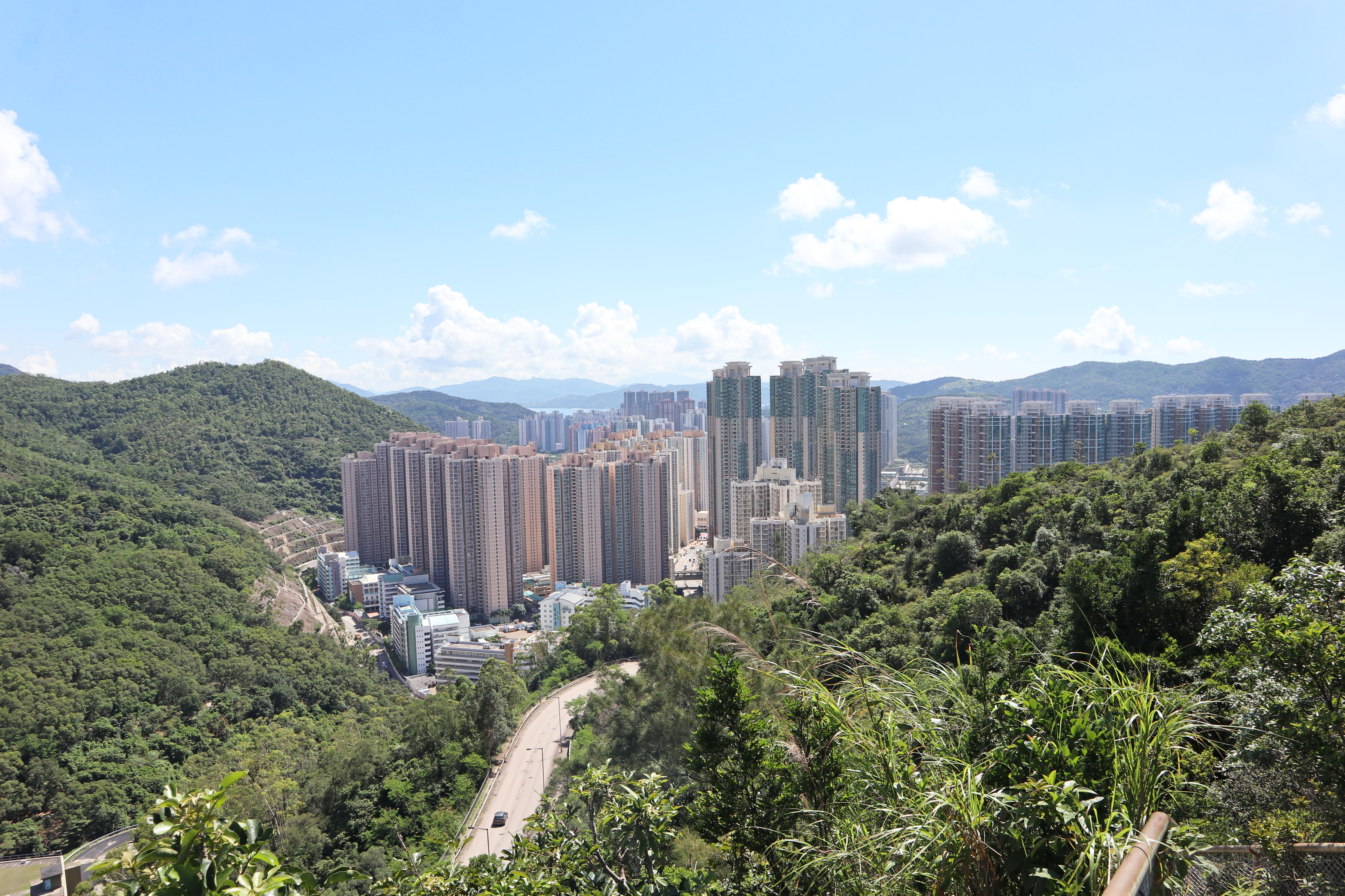 2020年調景嶺全貌